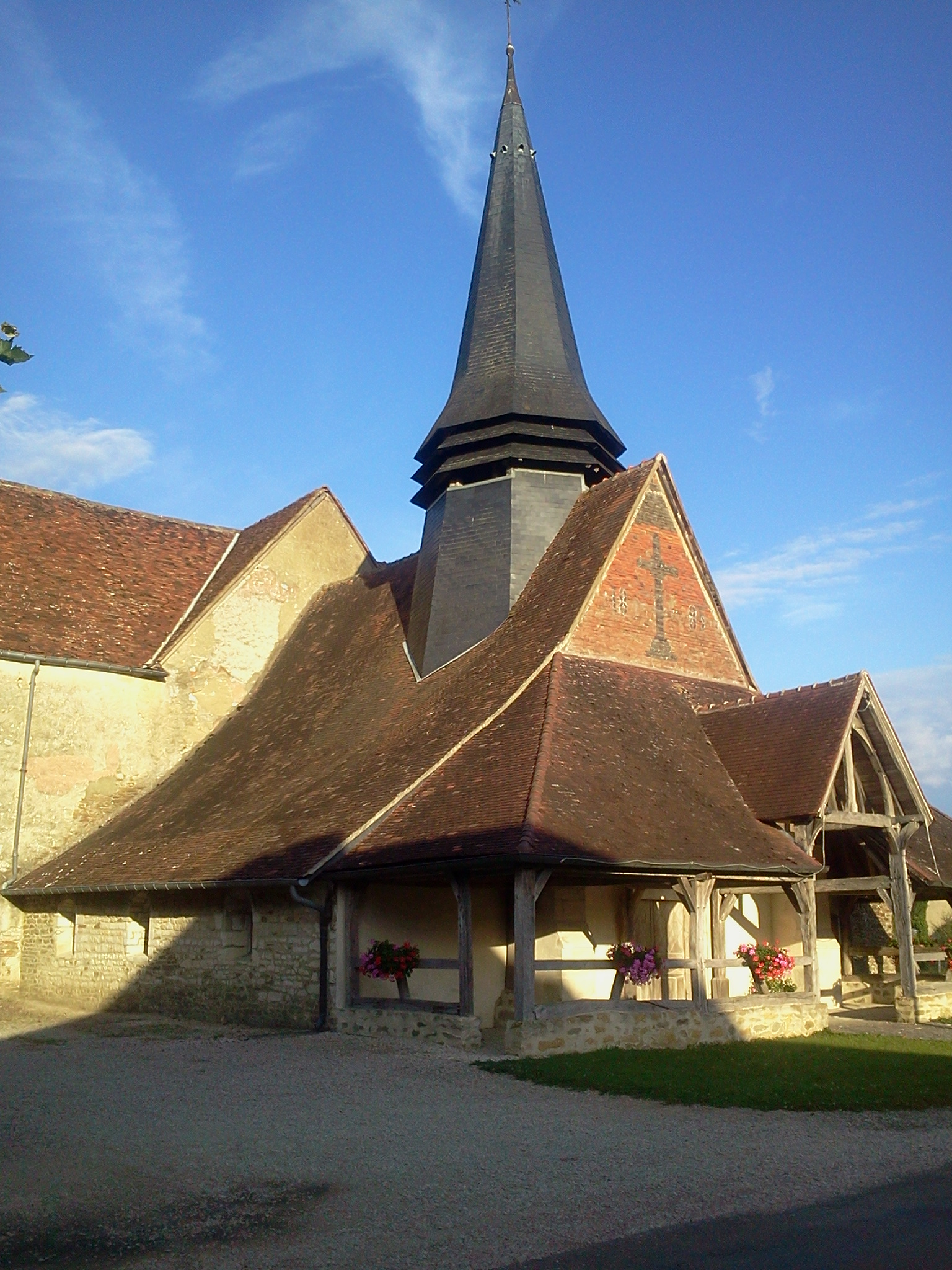 Église Saint-Éloi .